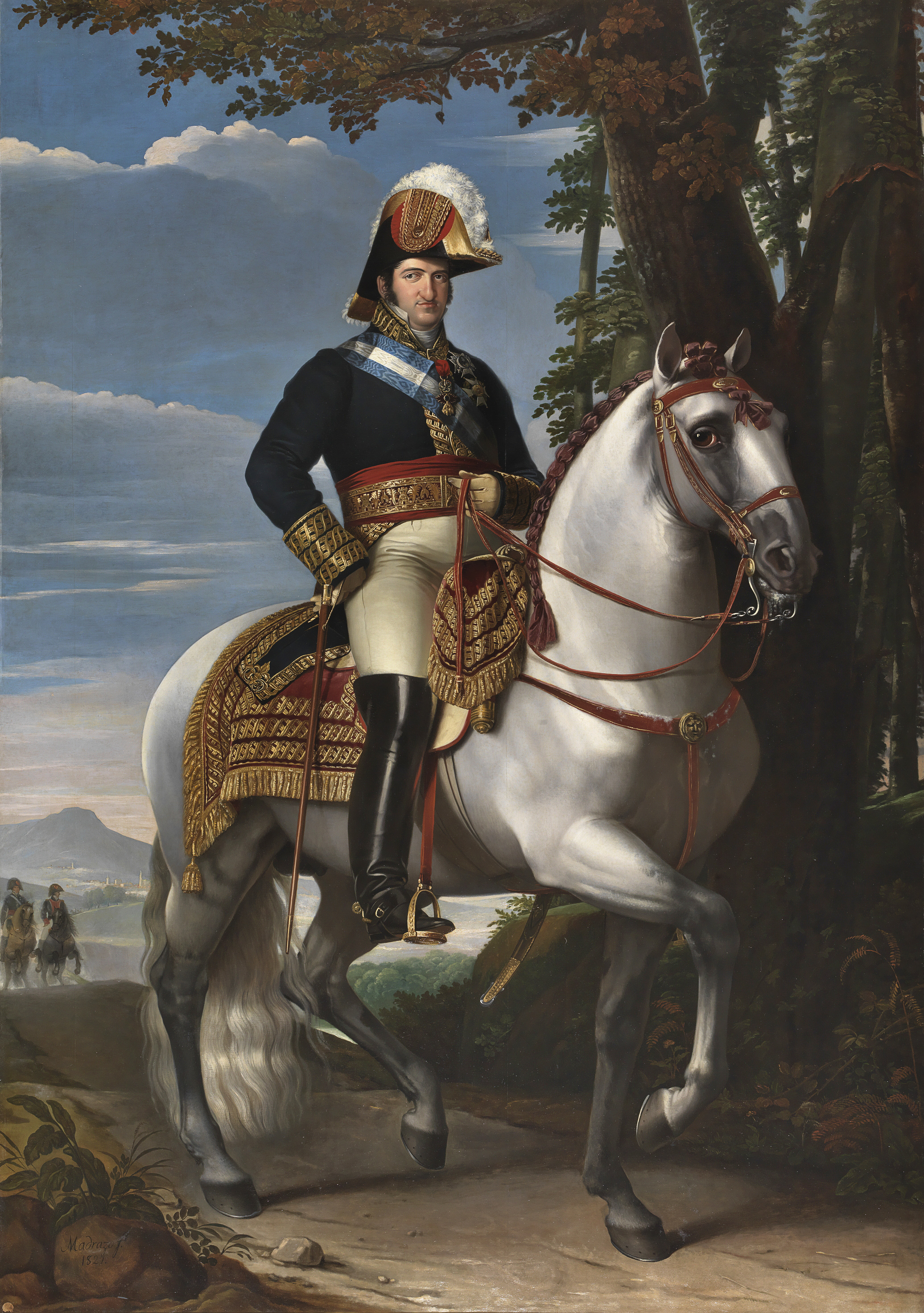 Retrato ecuestre del rey Fernando VII de España (1784-1833), hijo y heredero del rey Carlos IV de España.